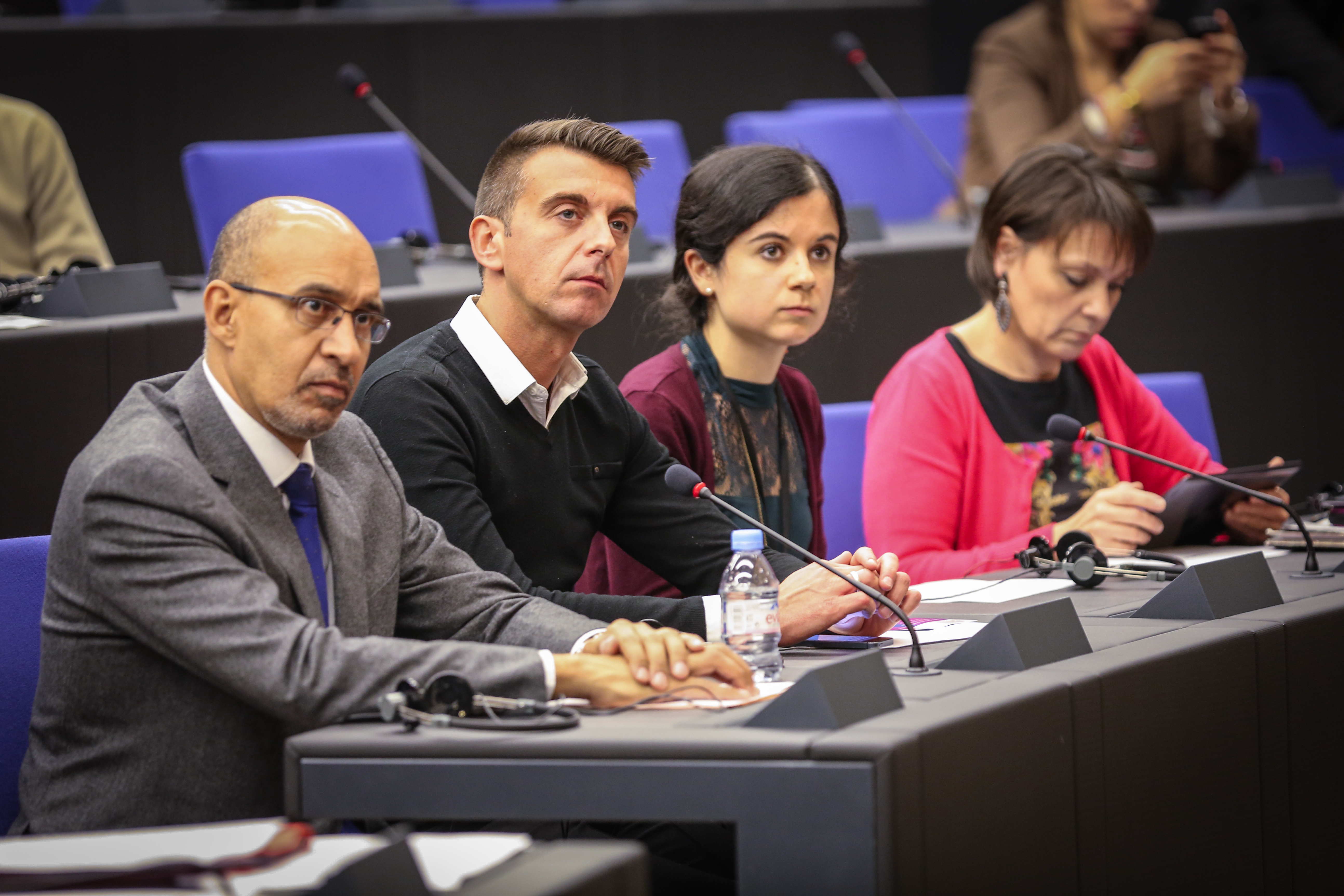 Conférence de presse et cérémonie d’inauguration de caliquots demandant la liberté pour les journalistes otages en Syrie. Parlement européen de Strasbourg, 5 février 2014 Harlem Désir.